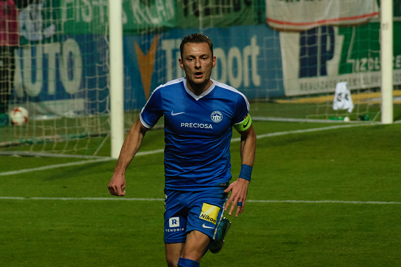 Vladimír Coufal